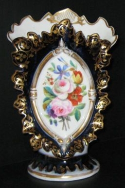 Vase en porcelaine de Valentine, France, XXe siècle